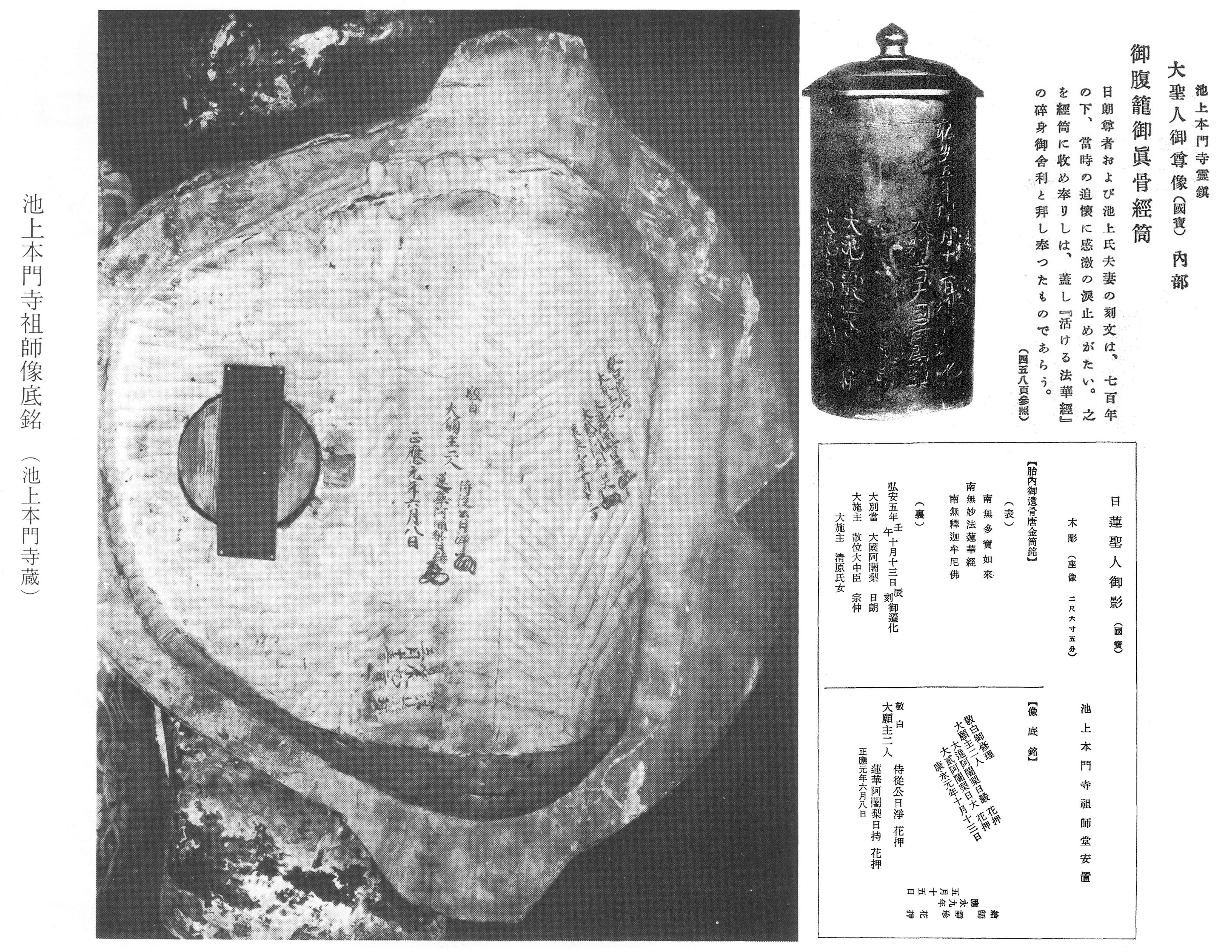 池上本門寺御影台座部分